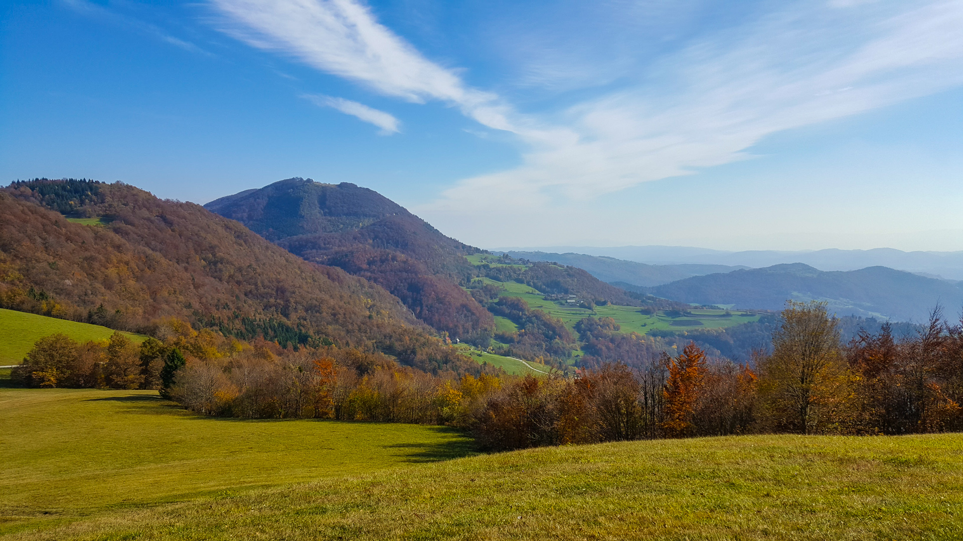 Sv. Lovrenc